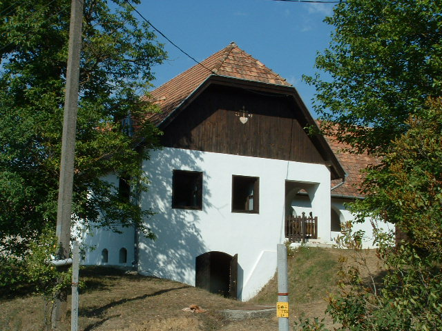 Bauernhof Szaknyér